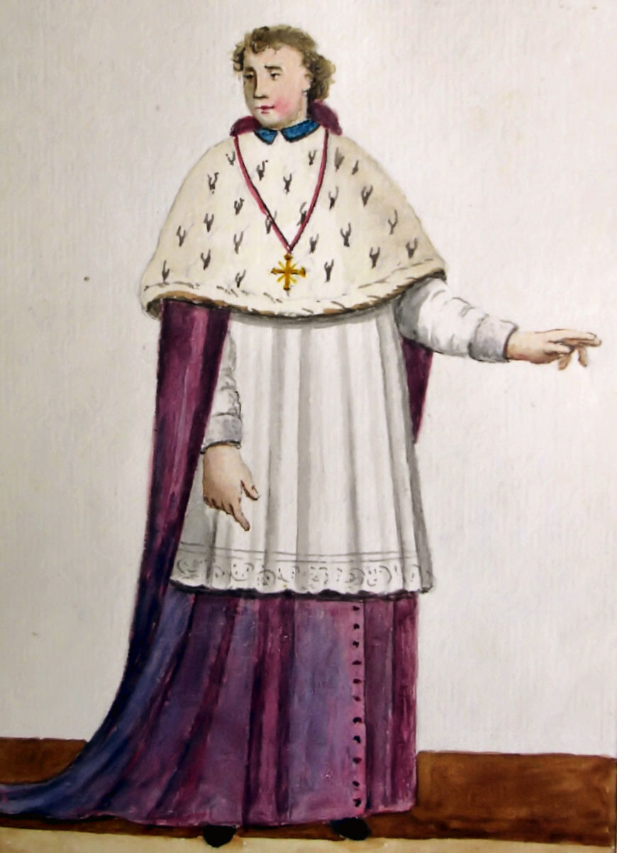 Catholic Choir dress Manuscript:,Ludovicus Clercq and Leo Vlaming, ghent 1812, Waerachtige verbeeldingen van alle de cleedingen der religieuse ordens Carolus 18:40, 23 March 2007 (UTC)